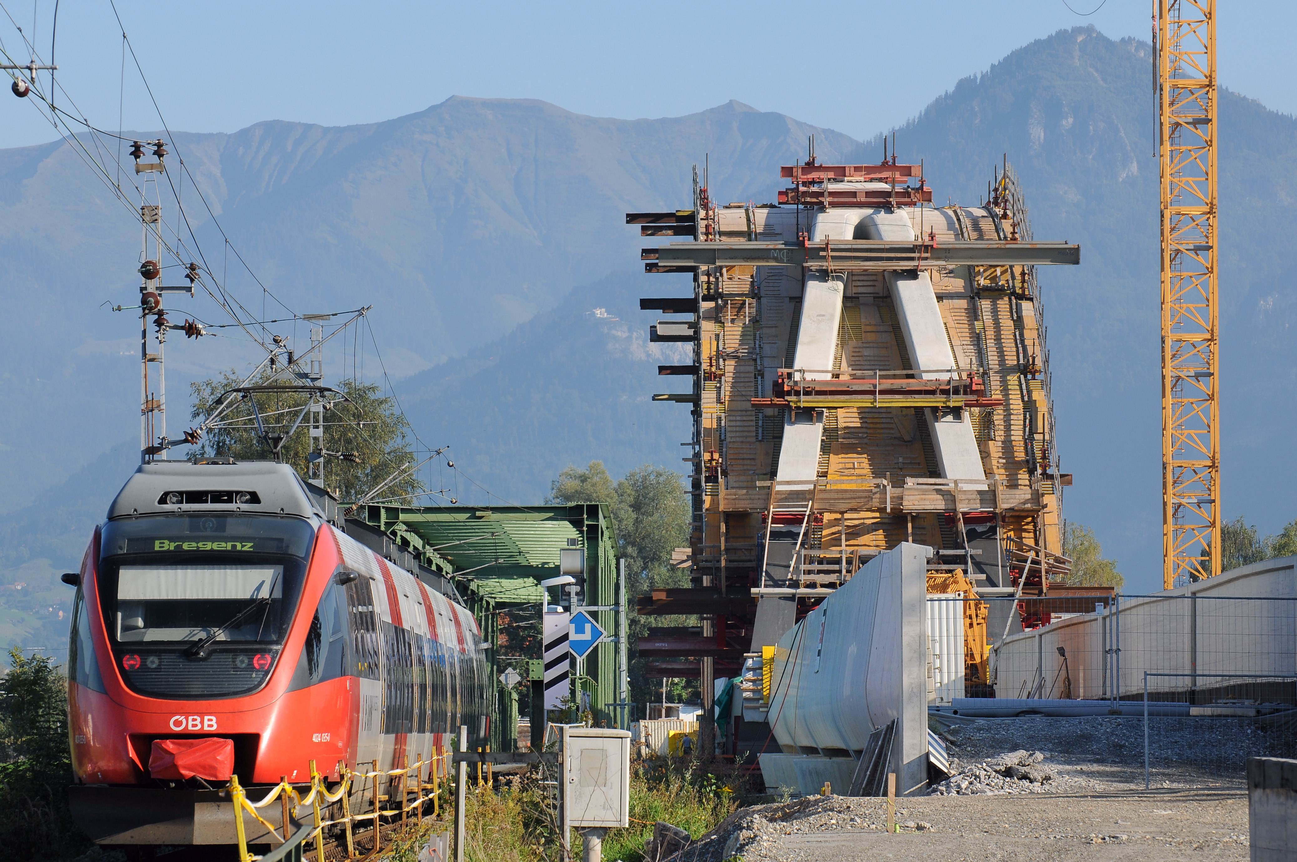 Die neue ÖBB Rheinbrücke verbindet St. Margrethen in der Schweiz und Lustenau in Österreich. Geplante Fertigstellung Frühjahr 2013. Siehe auch [1].